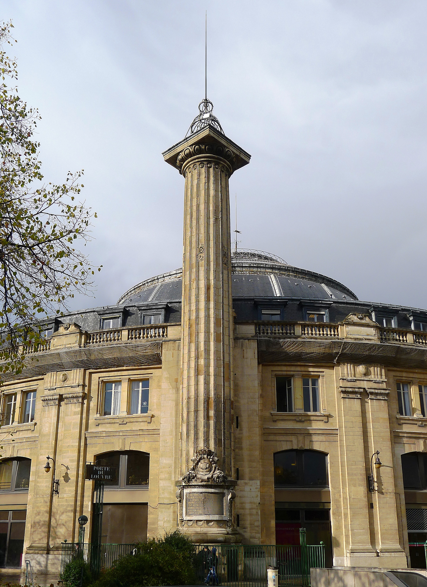 Colonne Medicis - Paris Ier